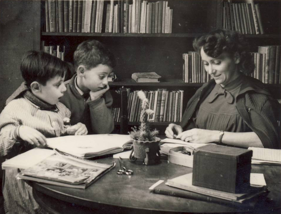 Teresa Rovira a la Biblioteca Popular d'Esparreguera, dècada de 1950, amb el seu fill Francesc Calvet en segon terme i un altre nen